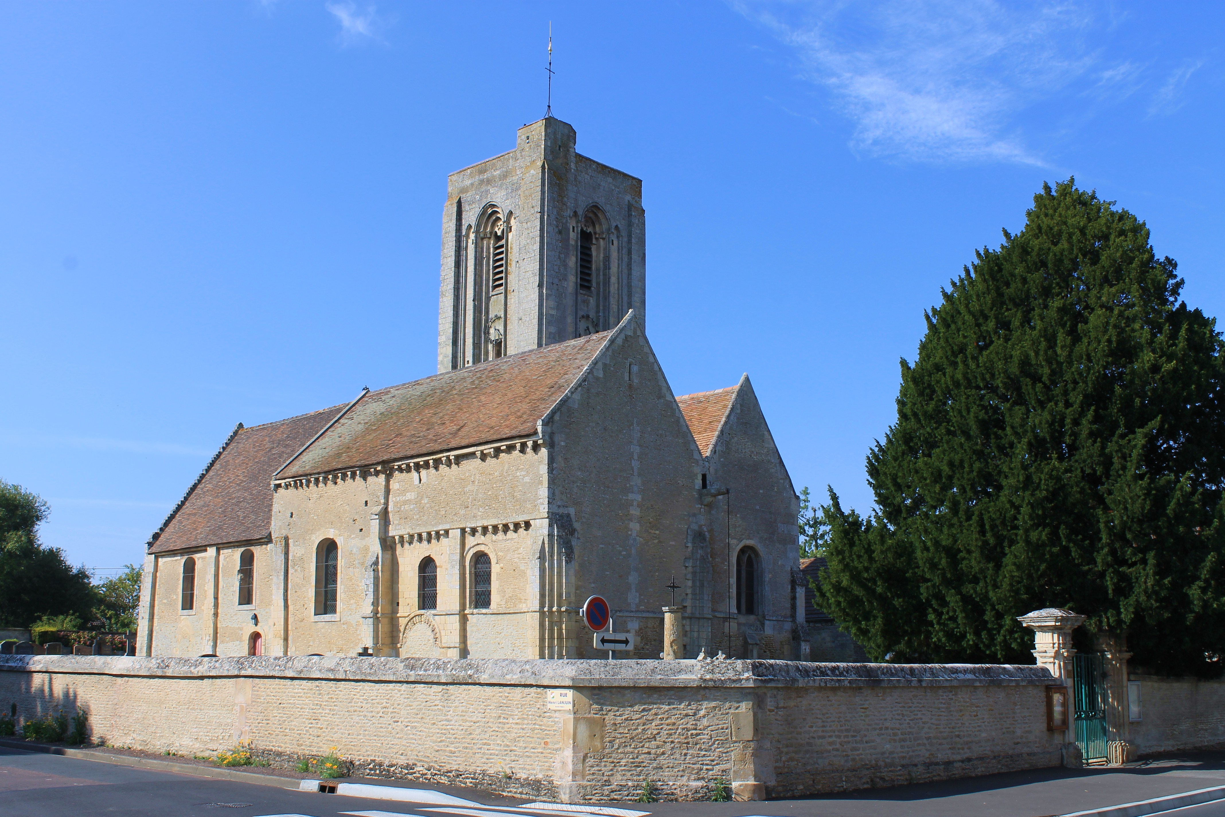 Sud-est de l'église Notre-Dame de Cuverville (Calvados) Base Mémoire